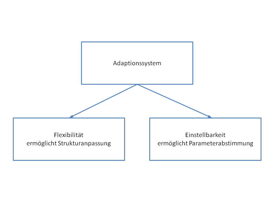 Flexibilität und Einstellbarkeit in einem adaptiven System.